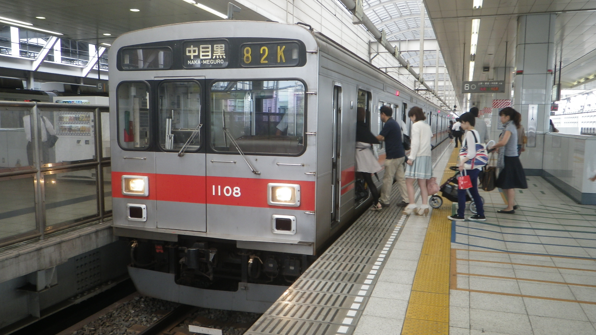 種別幕に何も表示しない東急1000系